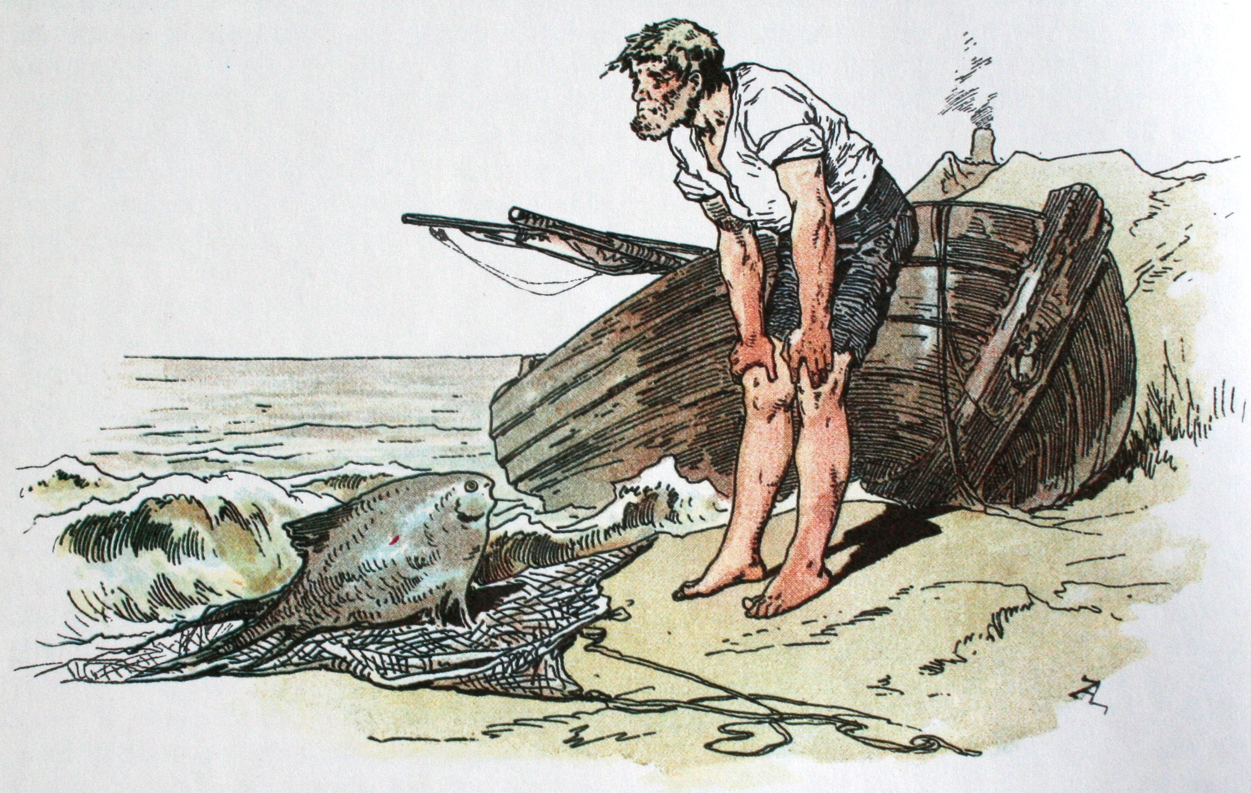 Vom Fischer und seiner Frau; Darstellung von Alexander Zick (1845–1907)